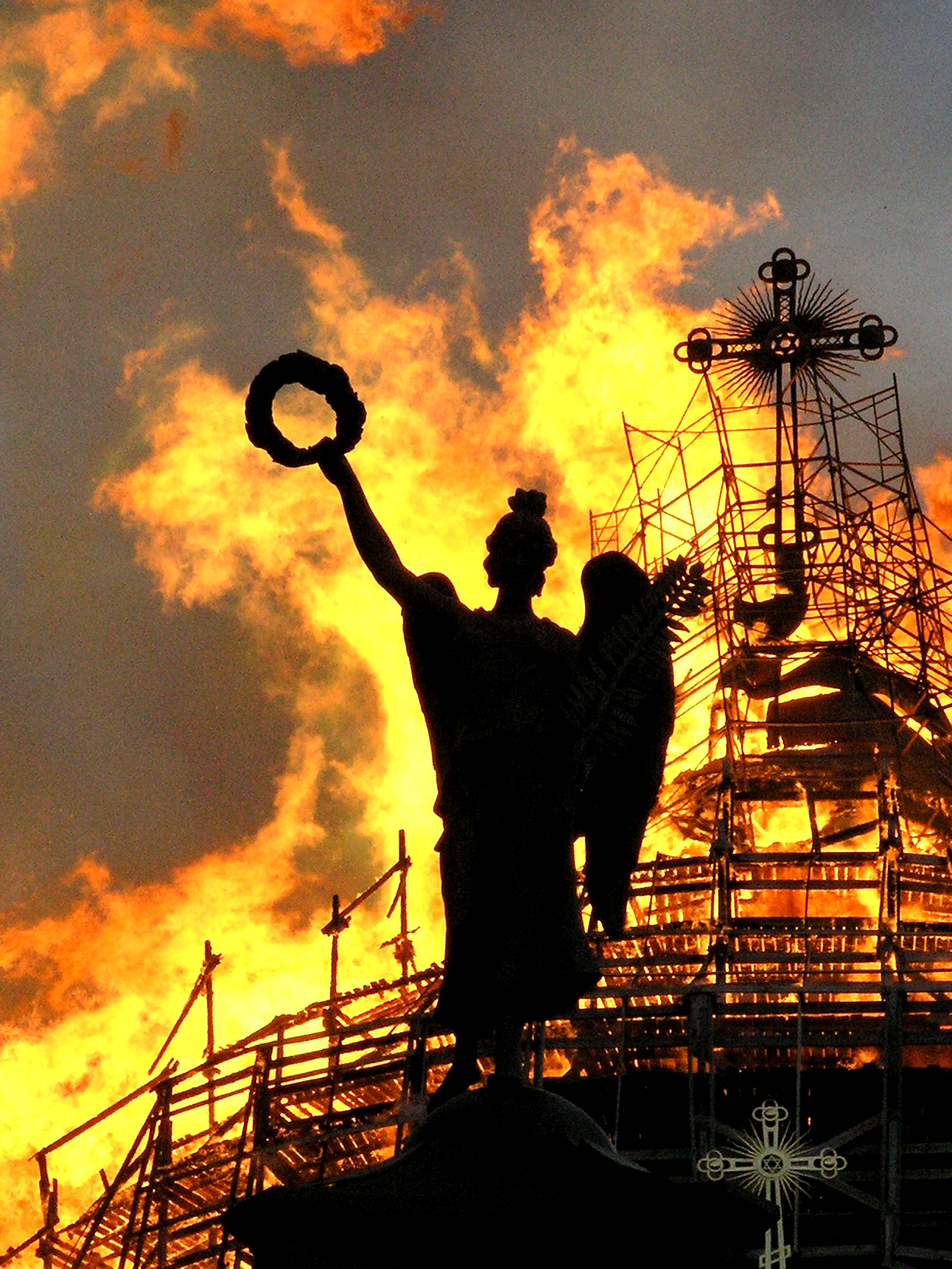 Пожар Троицкого собора в СПб